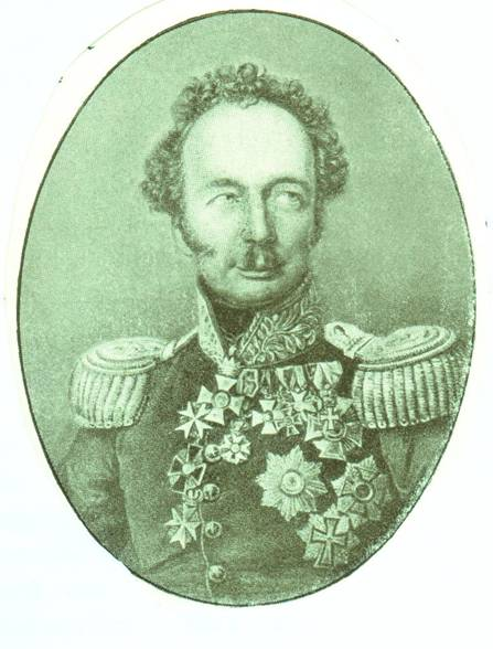 Friedrich Wilhelm Graf von Bismarck, 1814 - 1819 Kommandeur Jäger-Regiment zu Pferd Nr. 3 Kronprinz (Ulanen-Regiment „König Wilhelm I.“ (2. Württembergisches) Nr. 20)